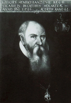 Zeitgenössisches Porträt Heinrich Rantzau (1526–1598)